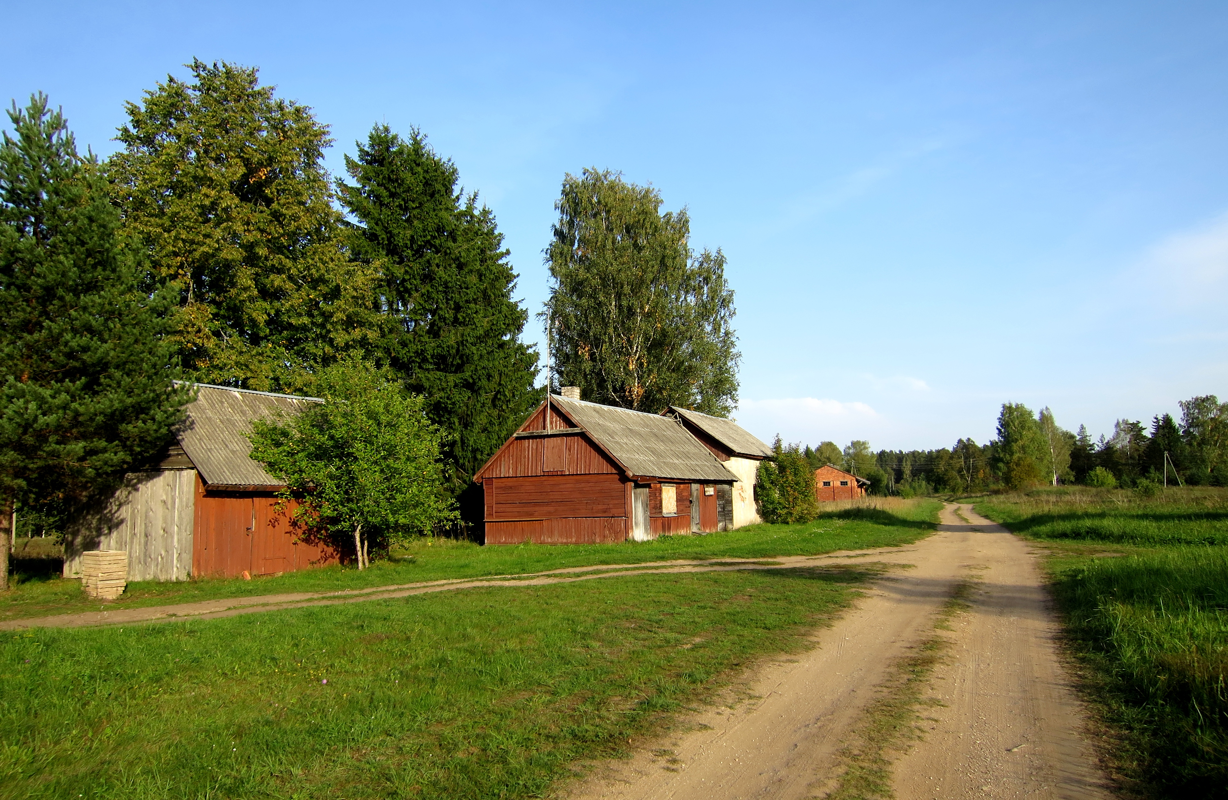 Piebalgas stacijas saimniecības ēkas